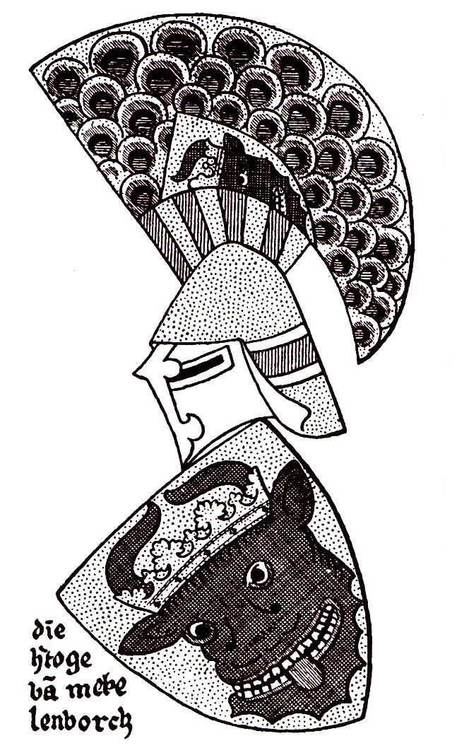 Wappen der Herzöge von Mecklenburg